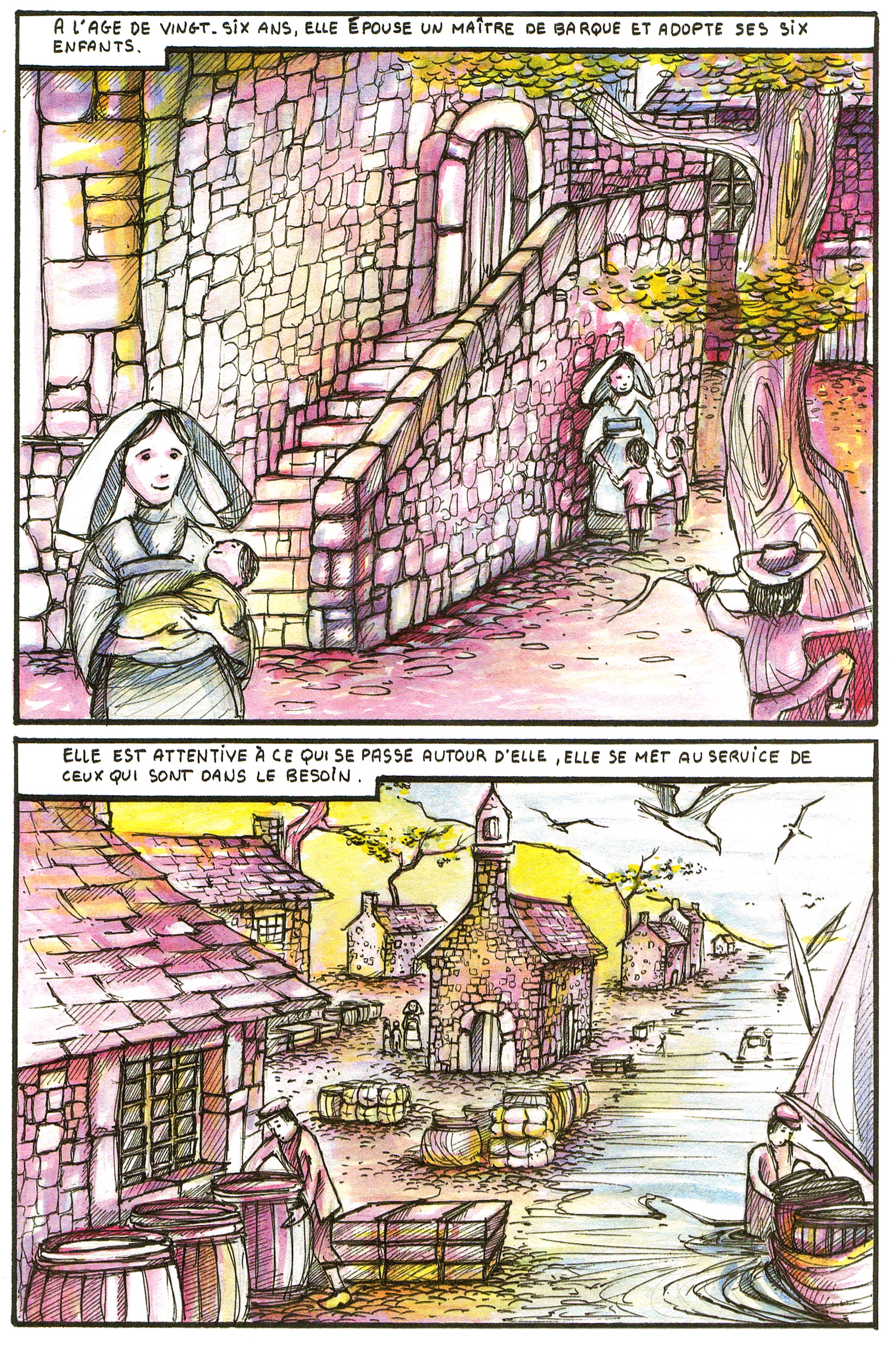 Dessin au crayon de couleur sur papier dessin